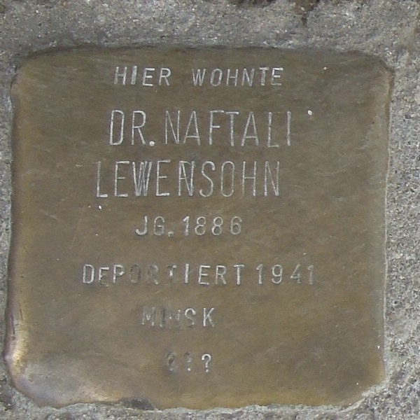 Stolperstein Bergedorf Dr Naftali Lewensohn Sachsentor 38